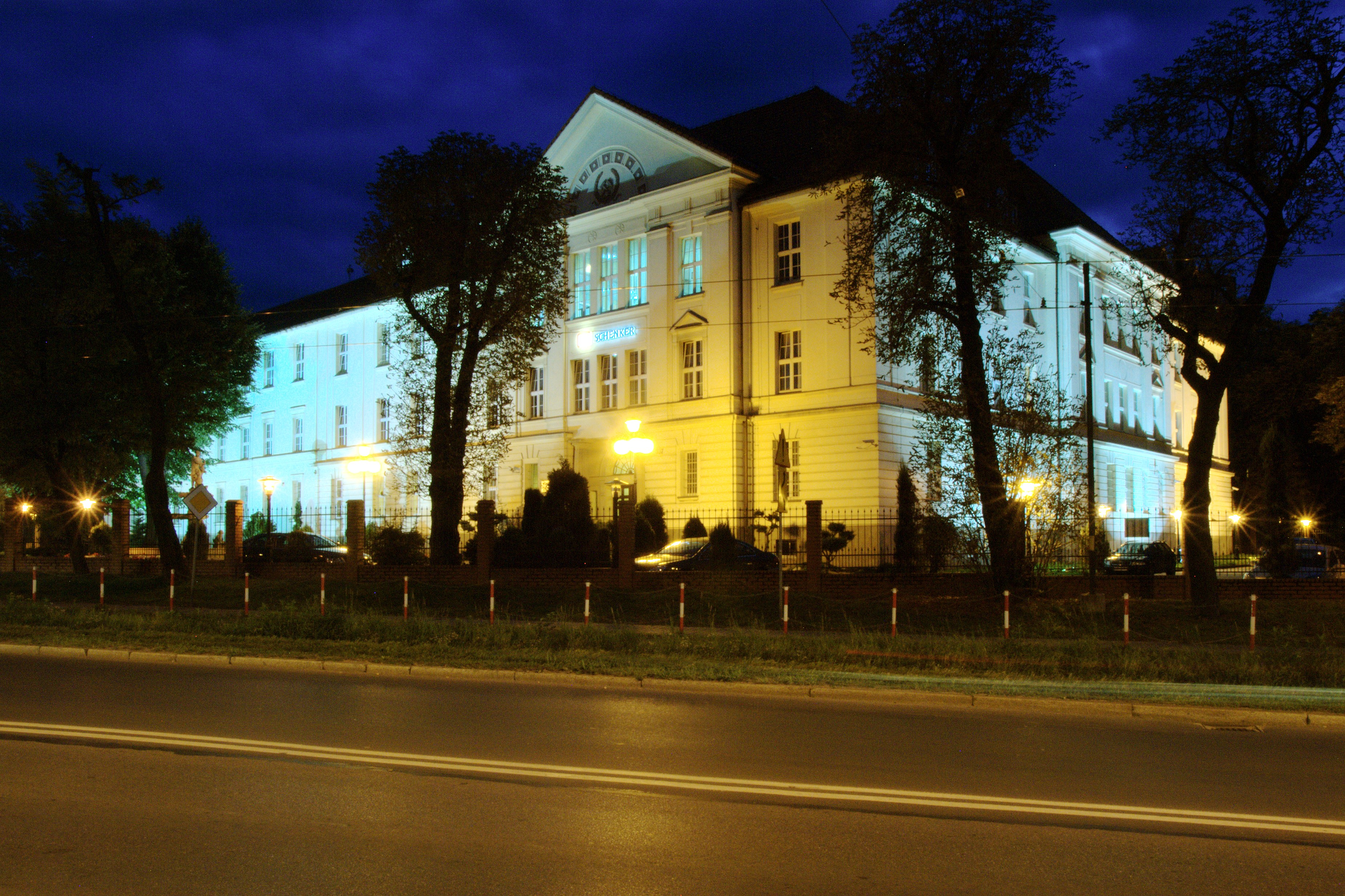 Ulica Wolności w Zabrzu. Biurowiec DB Schenker Rail Polska.